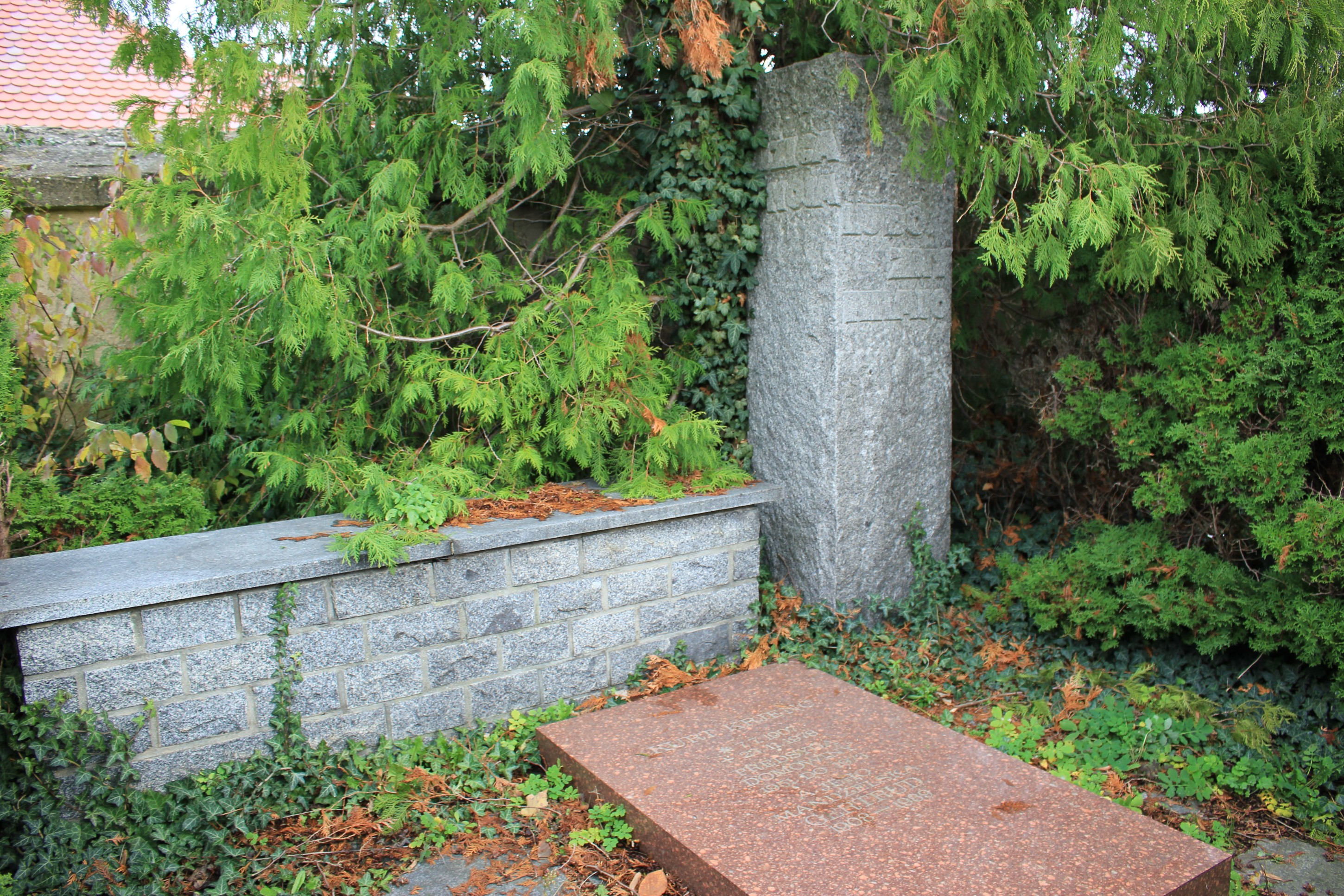 Hornjoserbsce: Row Kurta Krjeńca na Malešanskim kěrchowje.